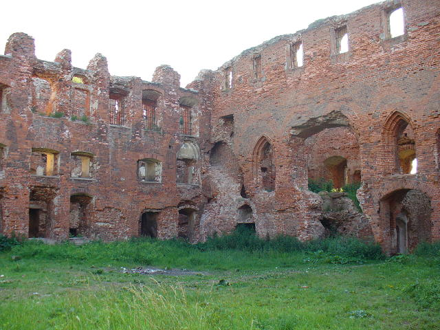 Ruine der Ordensburg in Neman (Ragnit, Foto: N. Ahting (User: Ballupoenen) Juni 2006